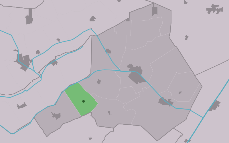 Kaartsje fan himrik fan Nijeberkeap